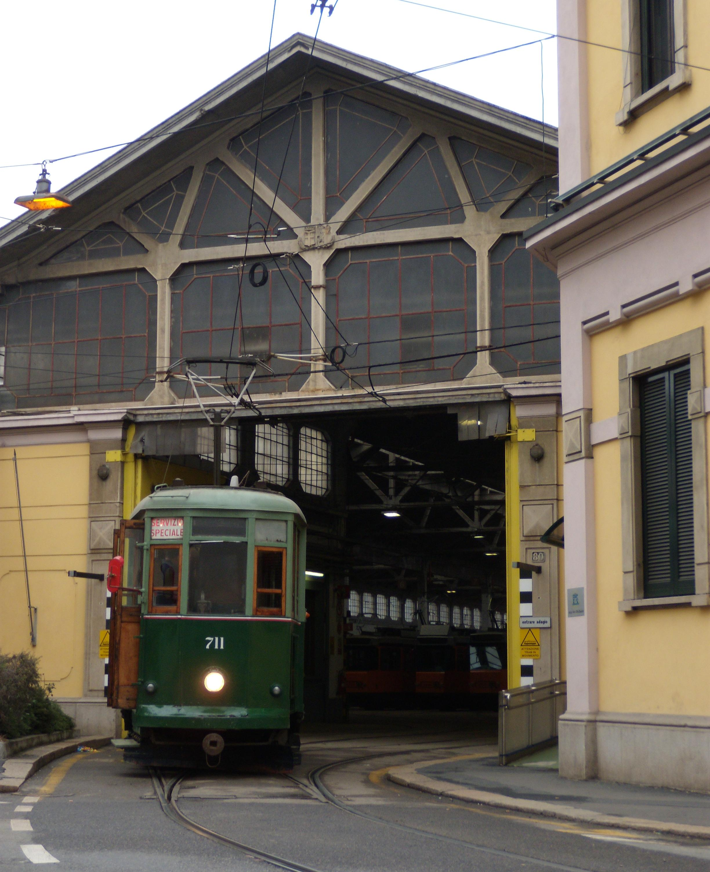 La 711 in uscita da Baggio in occasione di un noleggio.